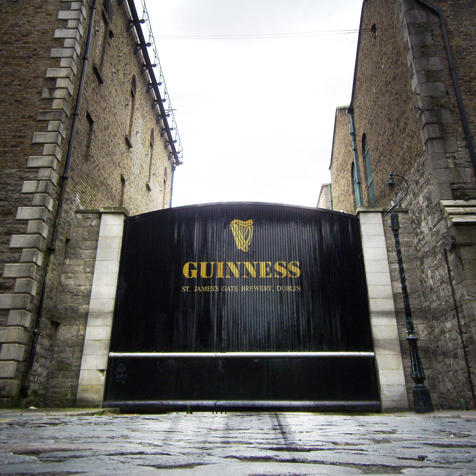 guinness